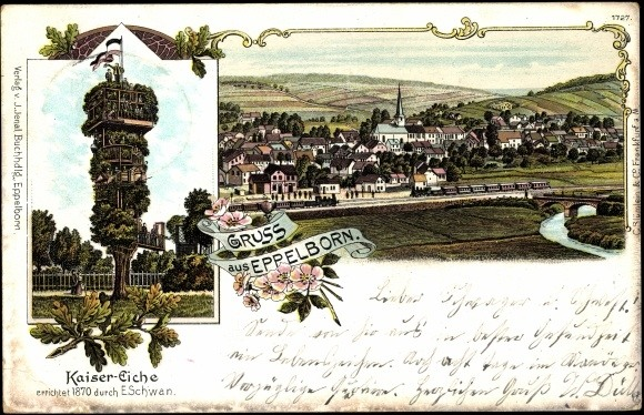 Postkarte Eppelborn mit Kaisereiche